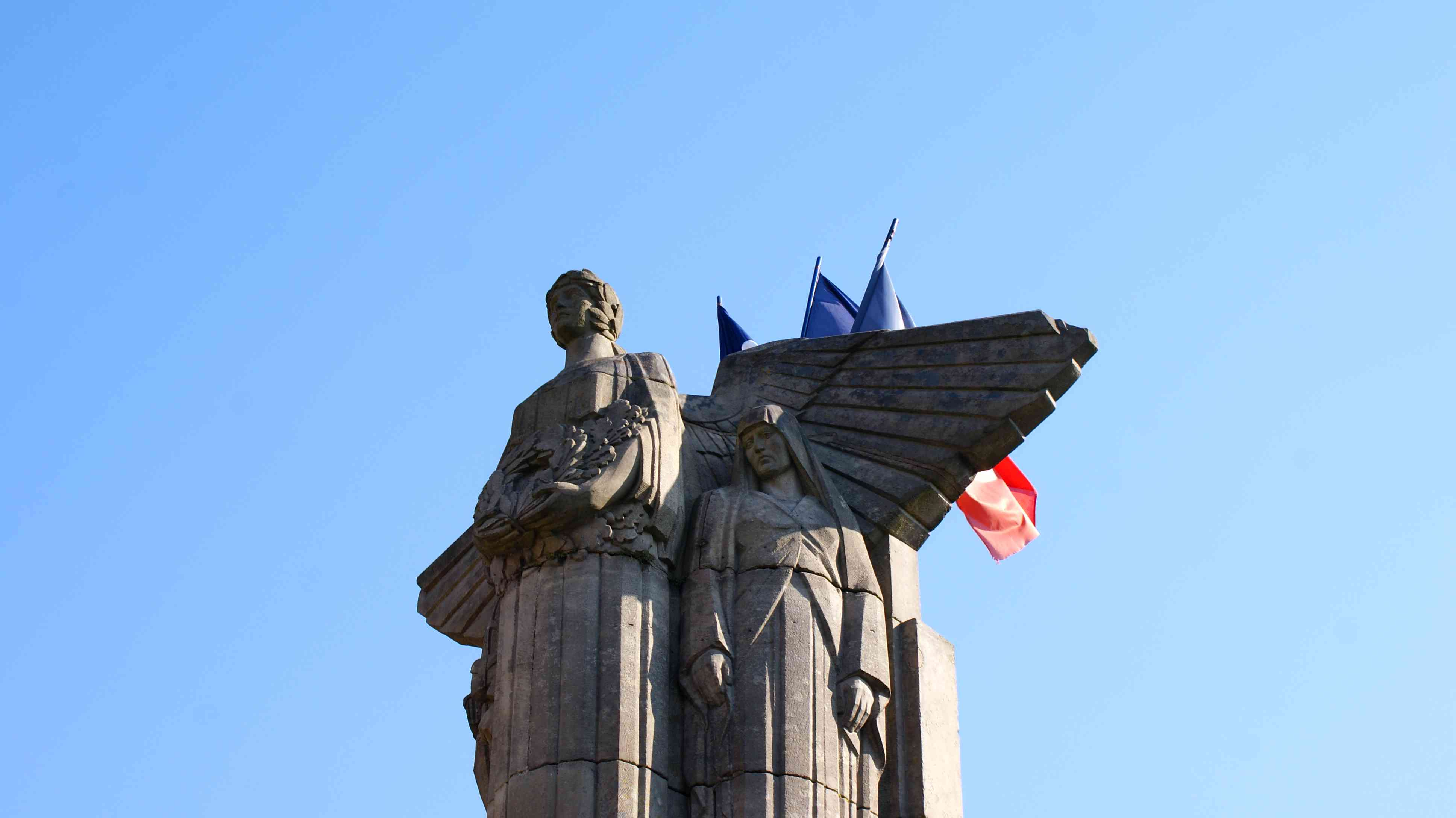 monument aux morts Badonviller